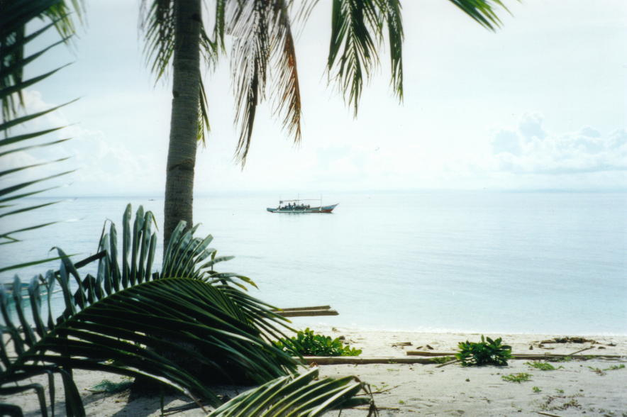 Palme mit Boot